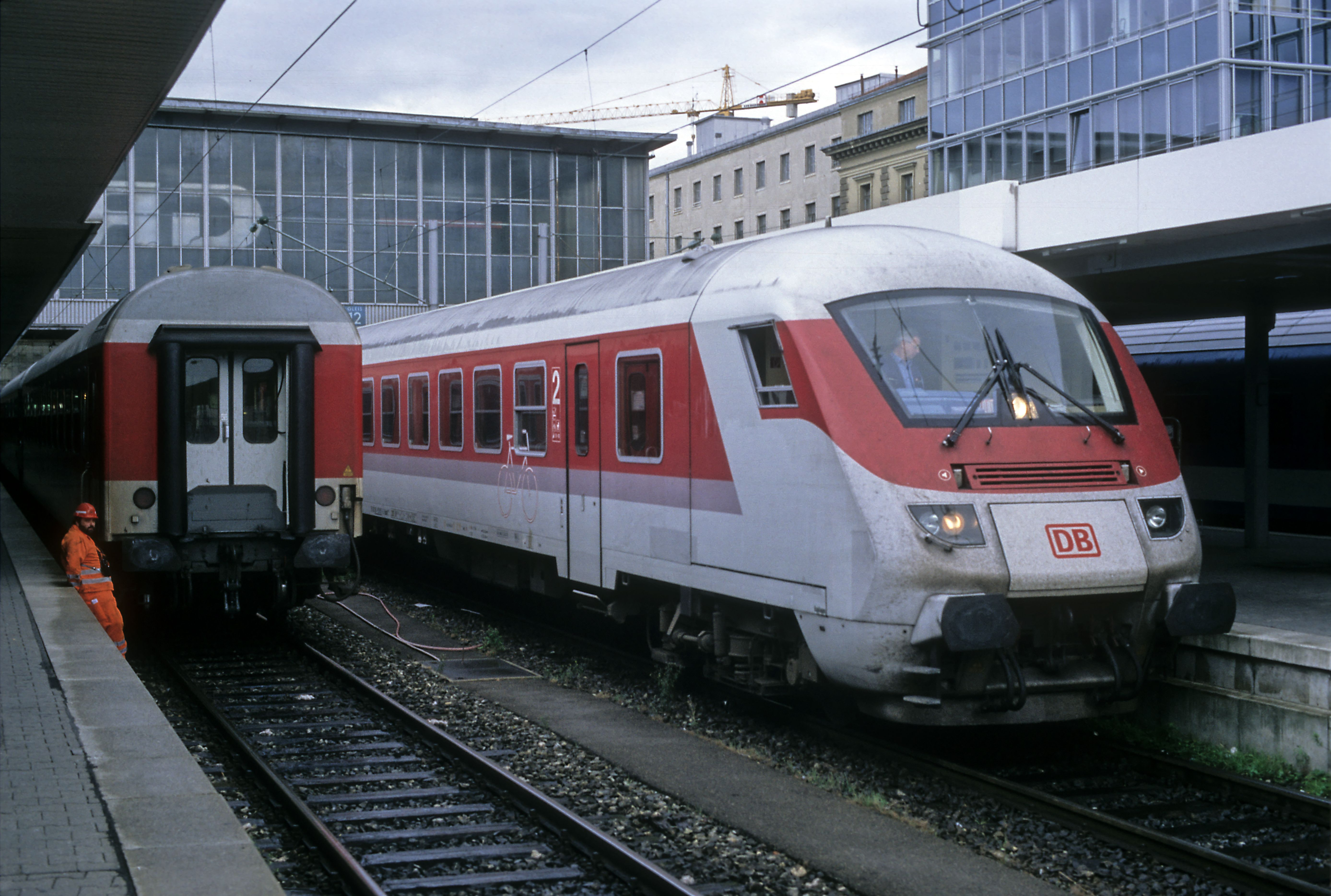 Fernbahnsteuerwagen in Interregiobauart mit IC-Anstrich. Bei dieser zweiten Bauart wurde der untere Teil der Bugklappe eingespart. Links ein Halberstädter Z-Wagen, der nach 1990 mit versetzten Einzelsitzen und mit IC-Anstrich geliefert wurde. Diese Wagen fallen durch die massiveren Übergangstüren mit Öffnungshilfe auf.